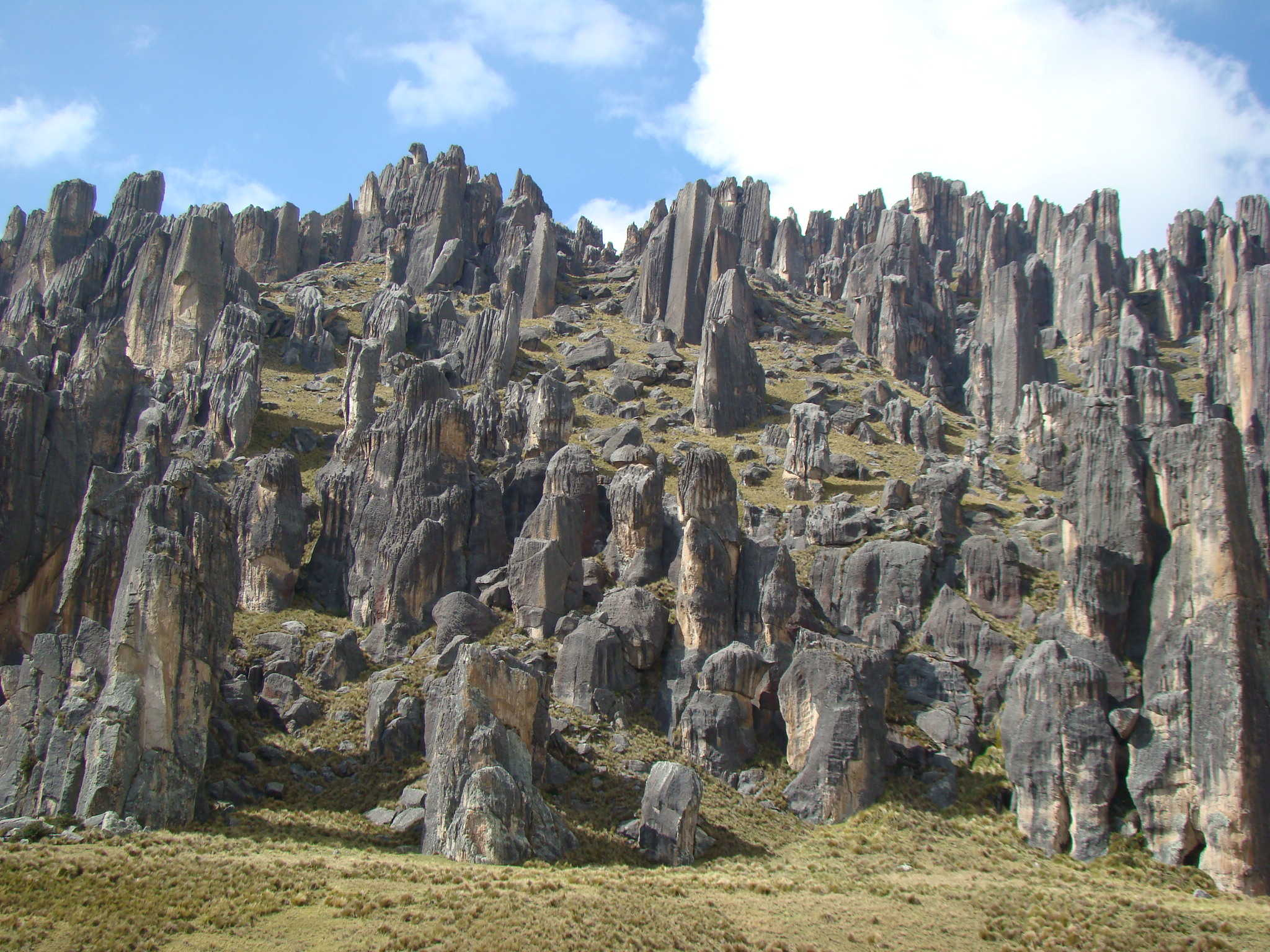 Runa Simi: Santuario de Cerro De Pasco